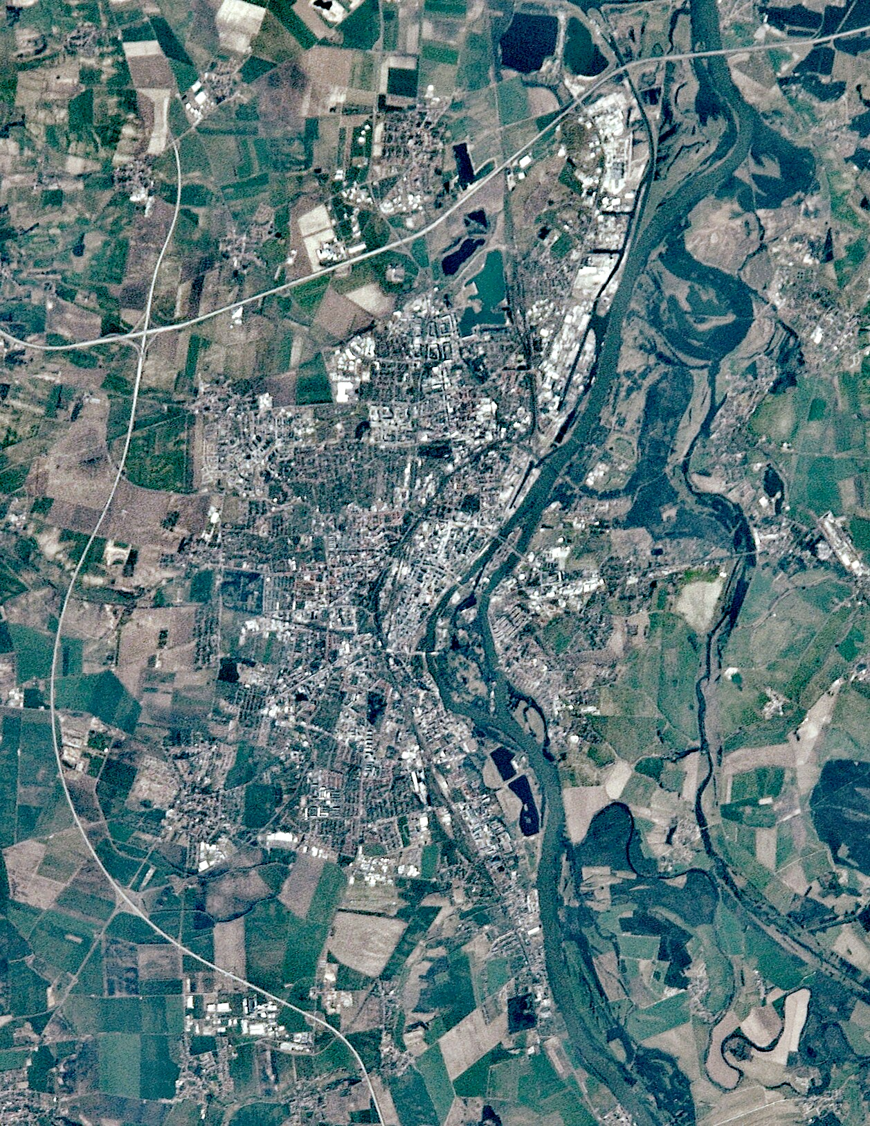 Satellitenbild von Magdeburg, aufgenommen aus der ISS